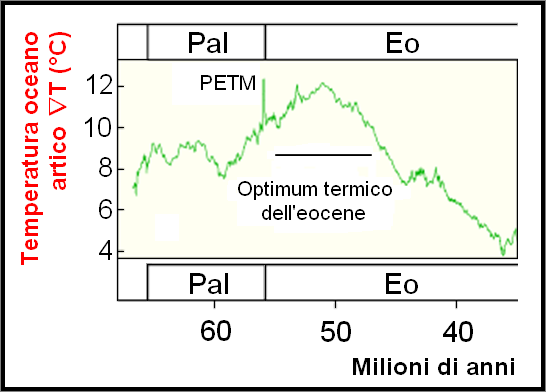 Detail with italian legenda of PETM Dettaglio con legenda in italiano del PETM